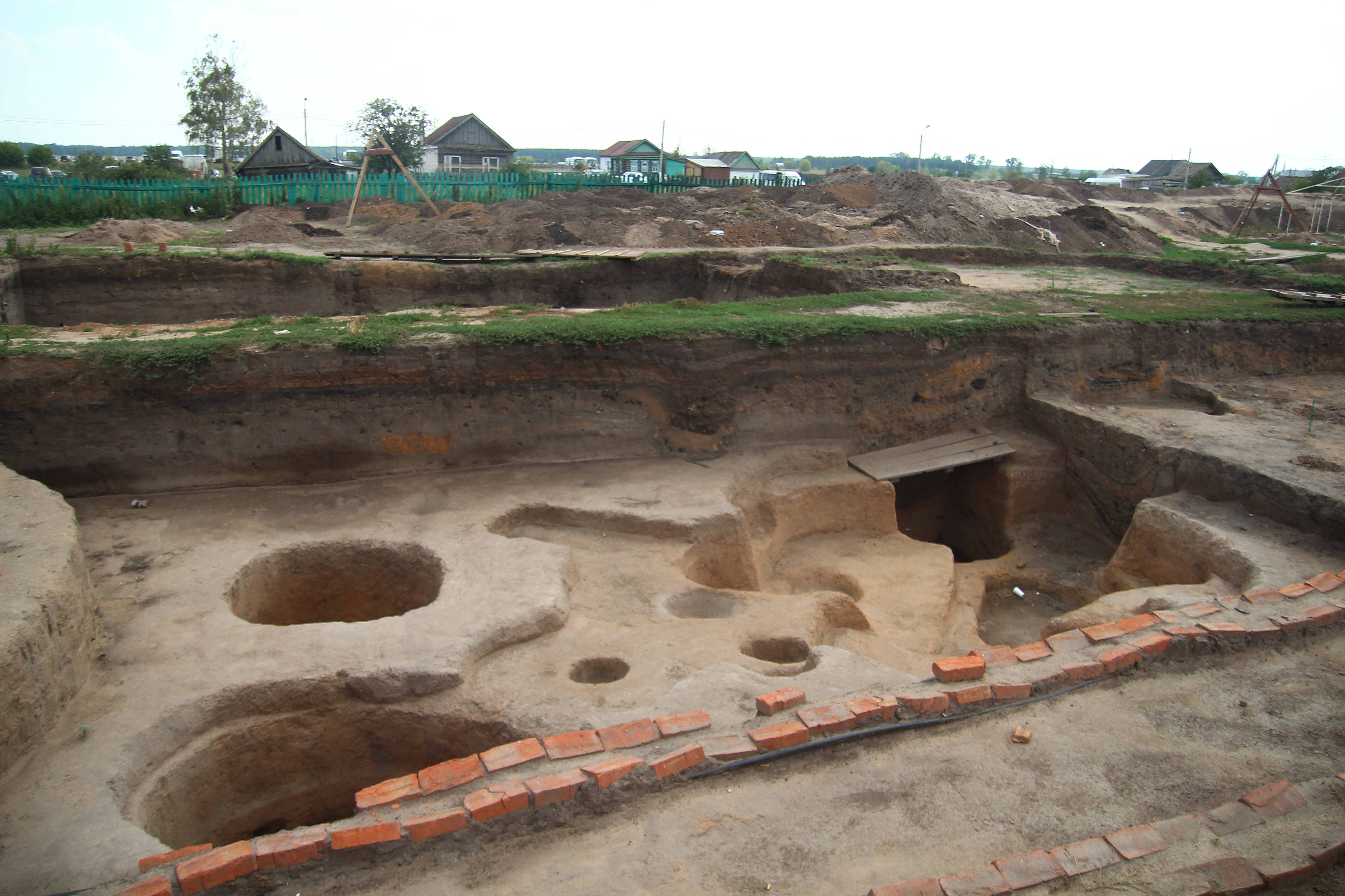 Комплекс памятников архитектуры XIII-XIV вв. на территории Булгарского городища (архитектурный комплекс «Болгары») (Республика Татарстан, Болгар, село Болгары, городище)